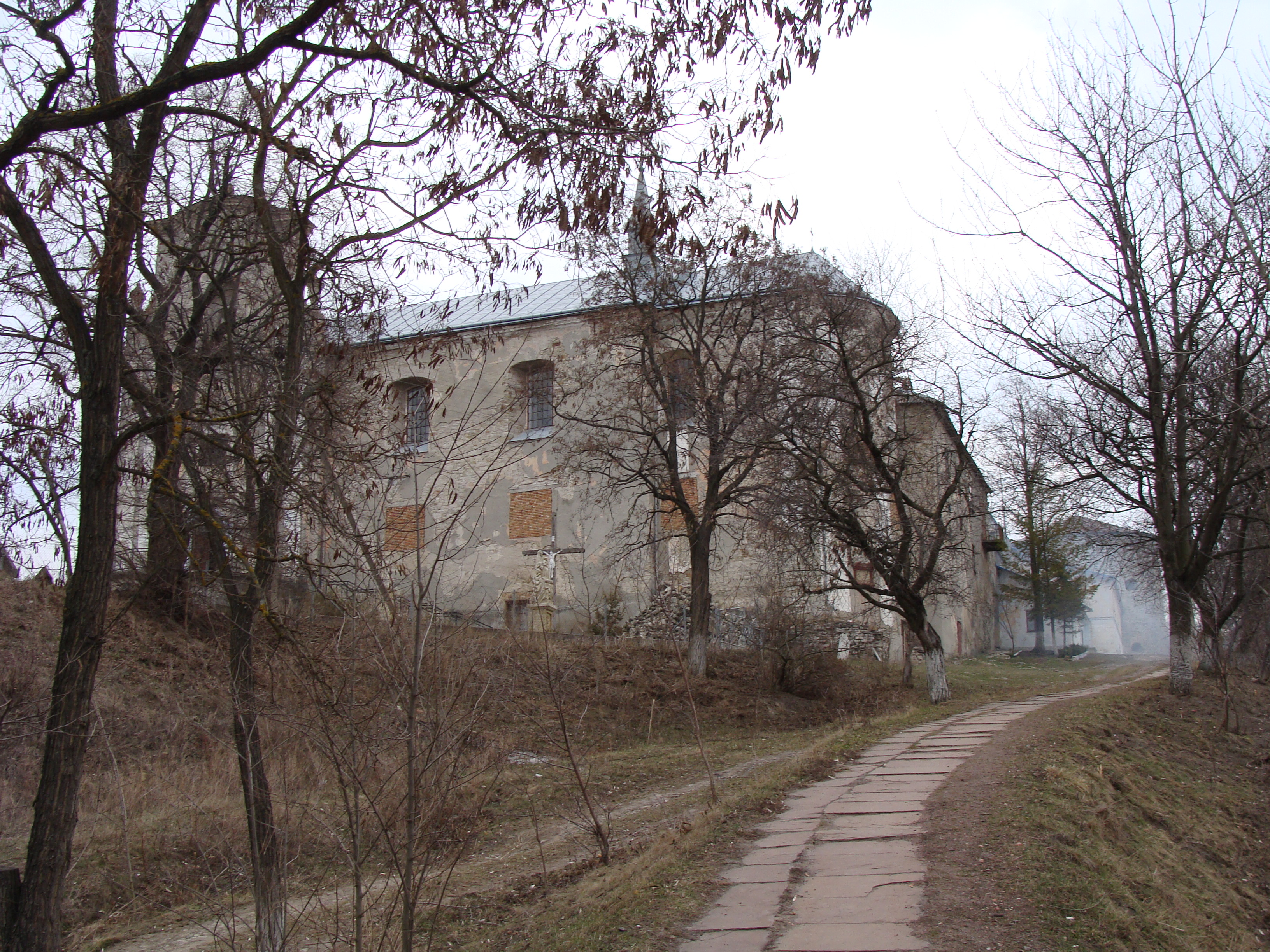 Замок(мур.), Буданів